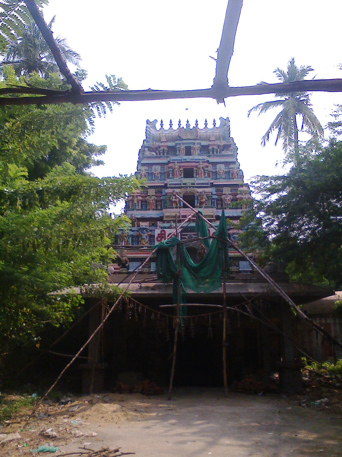 திருஆலம்பொழில் வடமுலேஸ்வரர் கோயில்